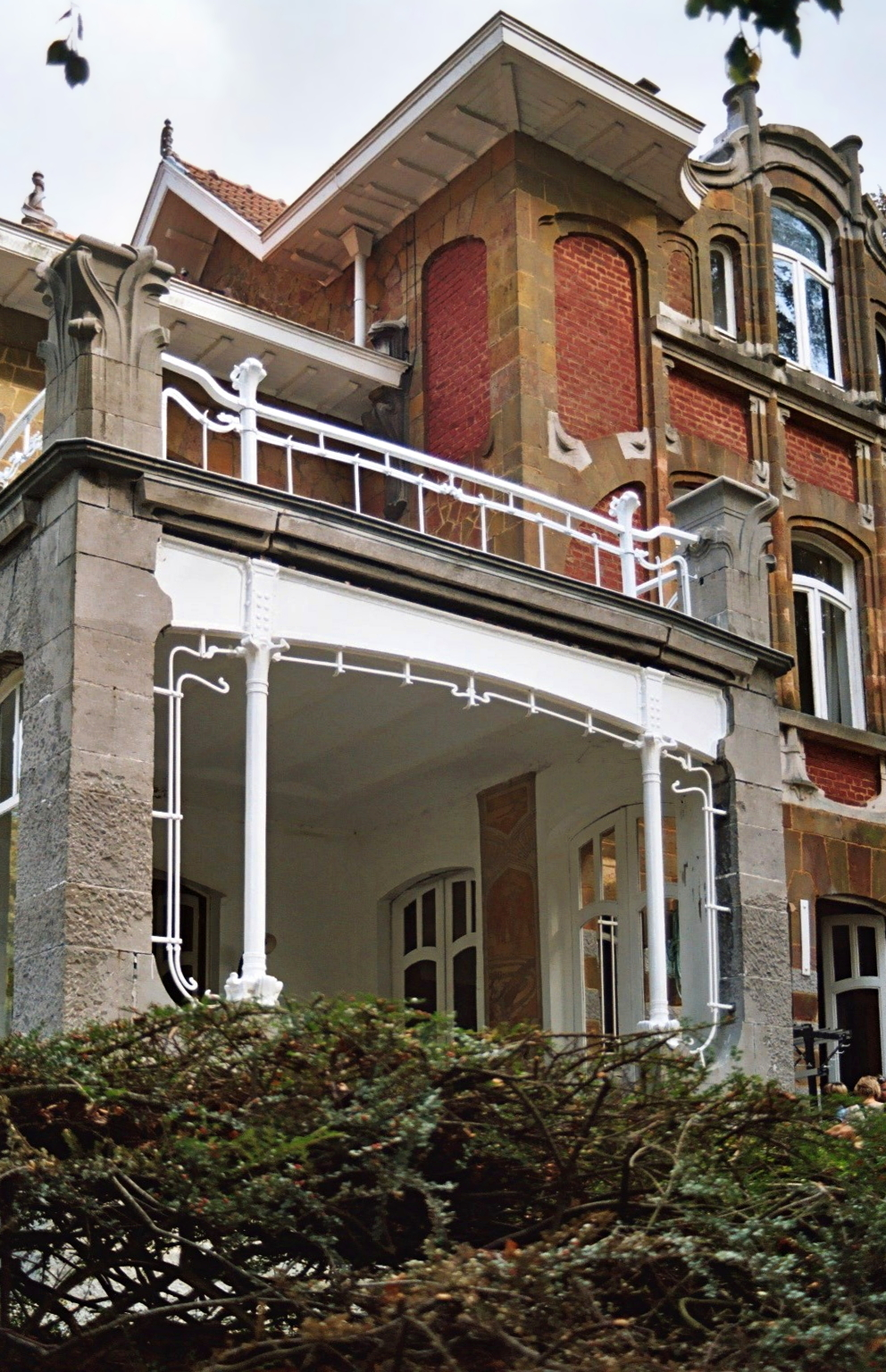 Belgique - Flandre-Orientale - Renaix - Villa Carpentier (Art nouveau, architecte Victor Horta, 1899-1903)